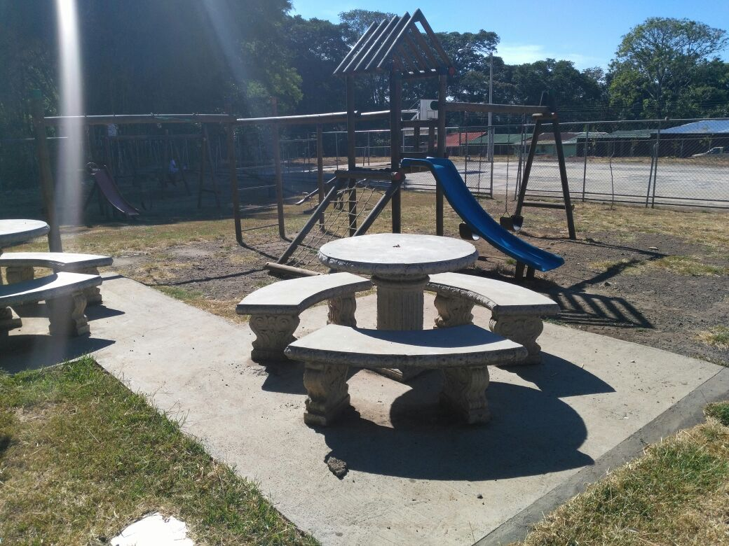 Foto del parque Urbanización La Brasilia